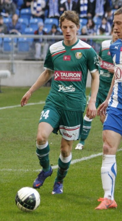 Polski piłkarz Tadeusz Socha